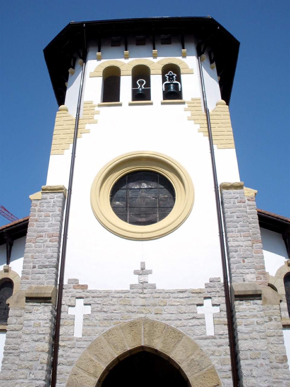 Iglesia de Santa María Magdalena (Fuenterrabía)